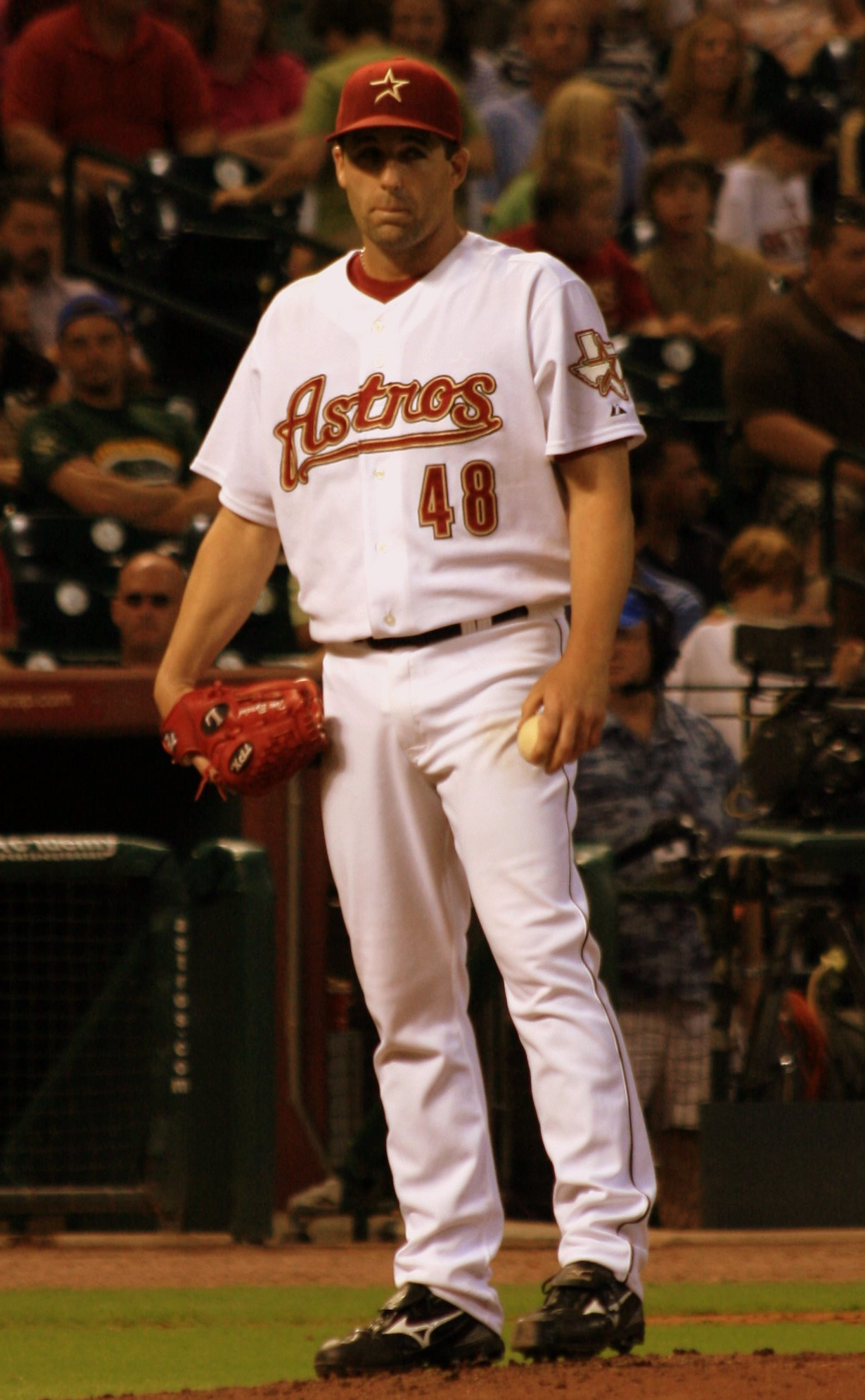 Tim Byrdak